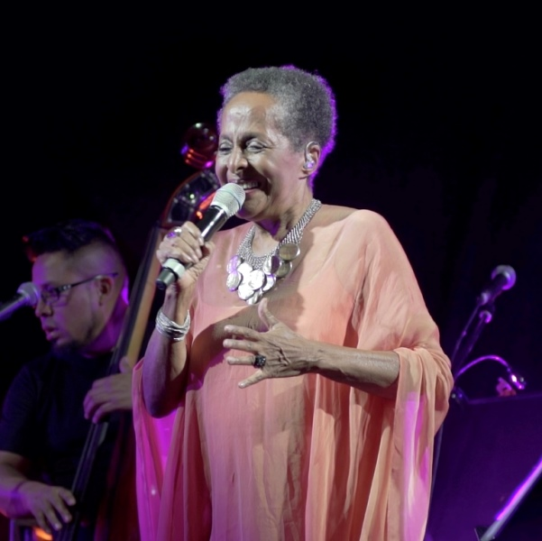 Los jardines de la Quinta de El Pardo fueron testigo anoche de los landós, pregones, y alegres panalavios que Susana Baca ofreció a los asistentes, en un amplio repertorio de ritmos afroperuanos recopilados y documentados por ella, dentro de un trabajo de investigación musical que, junto a su extraordinaria voz, le ha valido reconocimiento mundial.